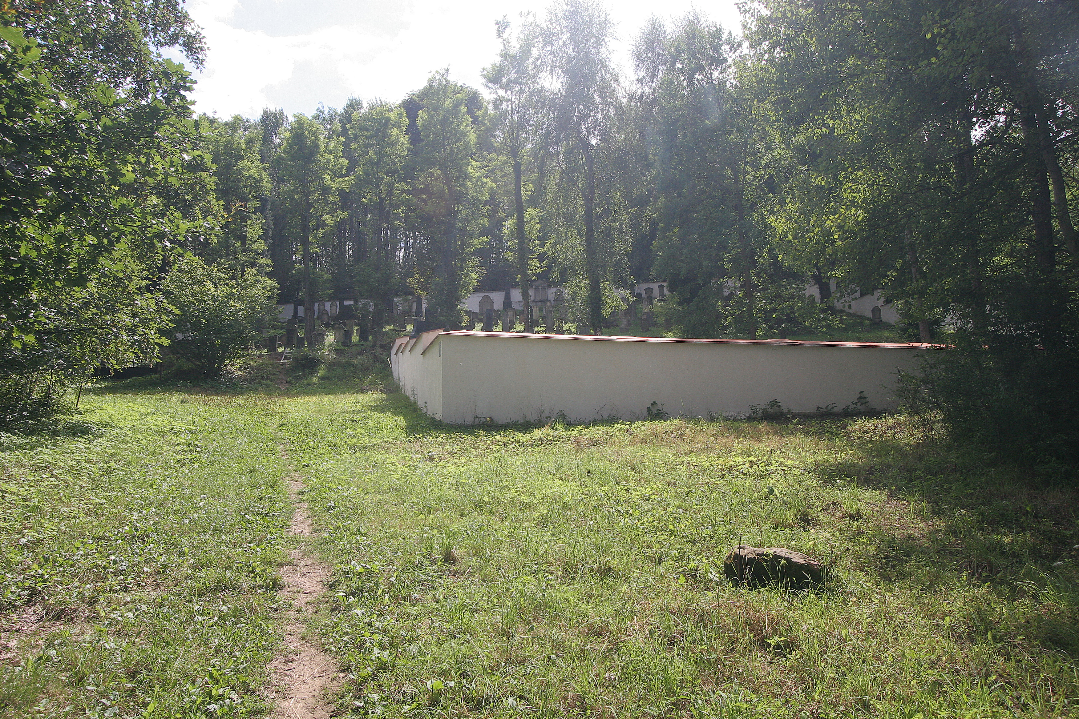 Židovský hřbitov (Úštěk), k. ú. Lhota u Úštěku, k. ú. Úštěk (České Předměstí)